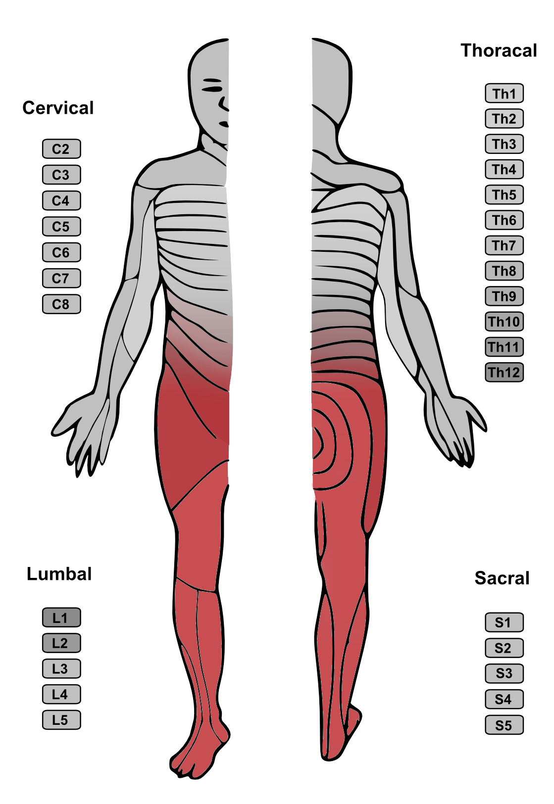 Ausmaß der Betäubung bei einer mittelhohen Spinalanästhesie (rot), hier etwa unterhalb des Dermatoms Th 10